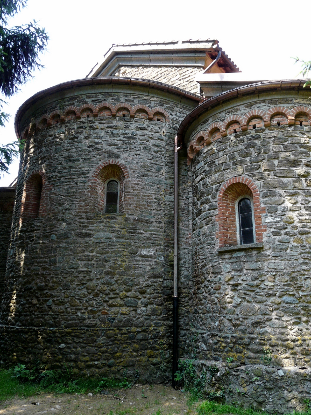 Particolare delle absidi della chiesa di Santa Maria in Vezzulla, Masone, Liguria, Italia